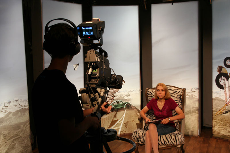 Aufzeichnung einer Moderation